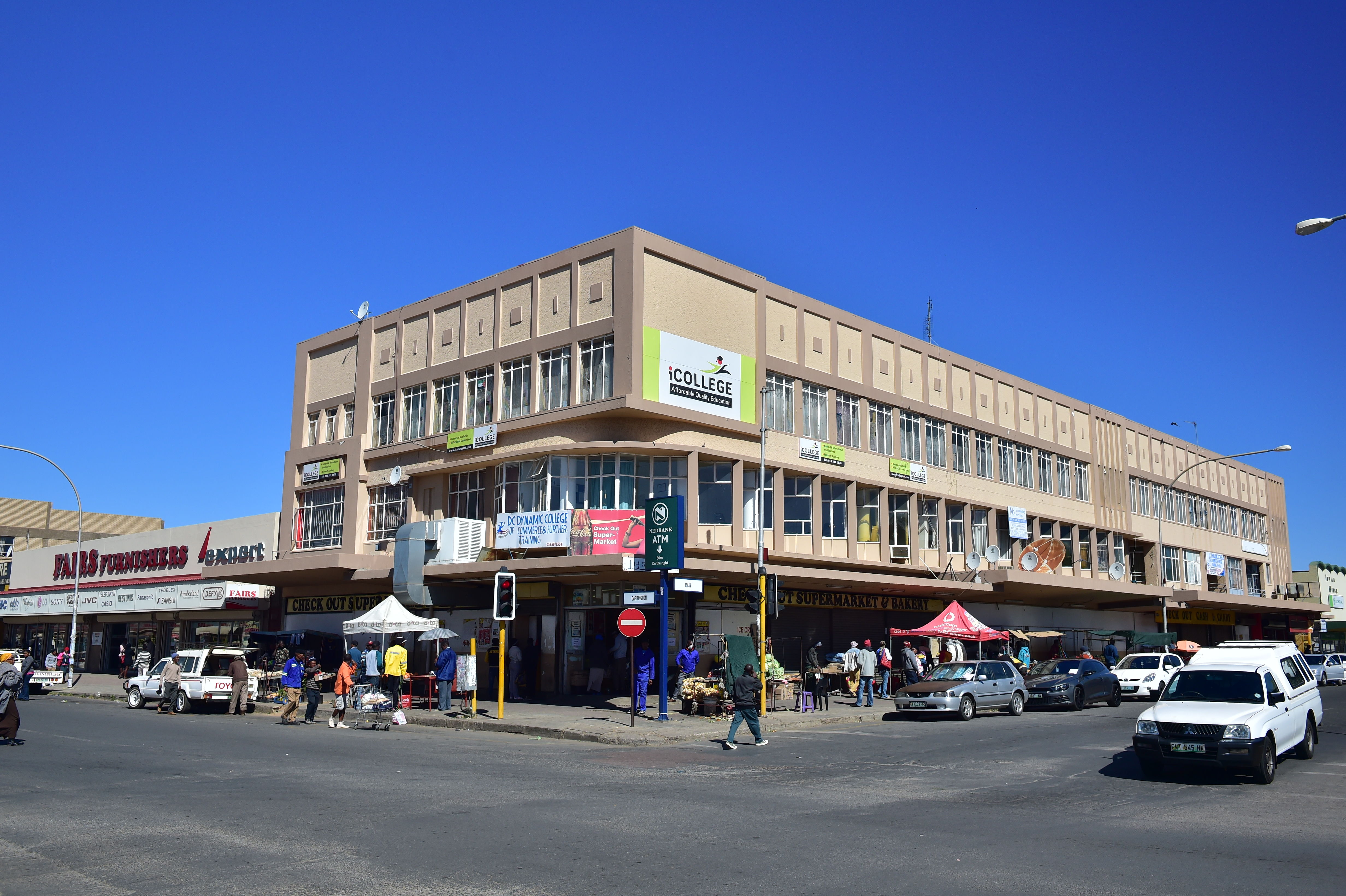 Mahikeng town.